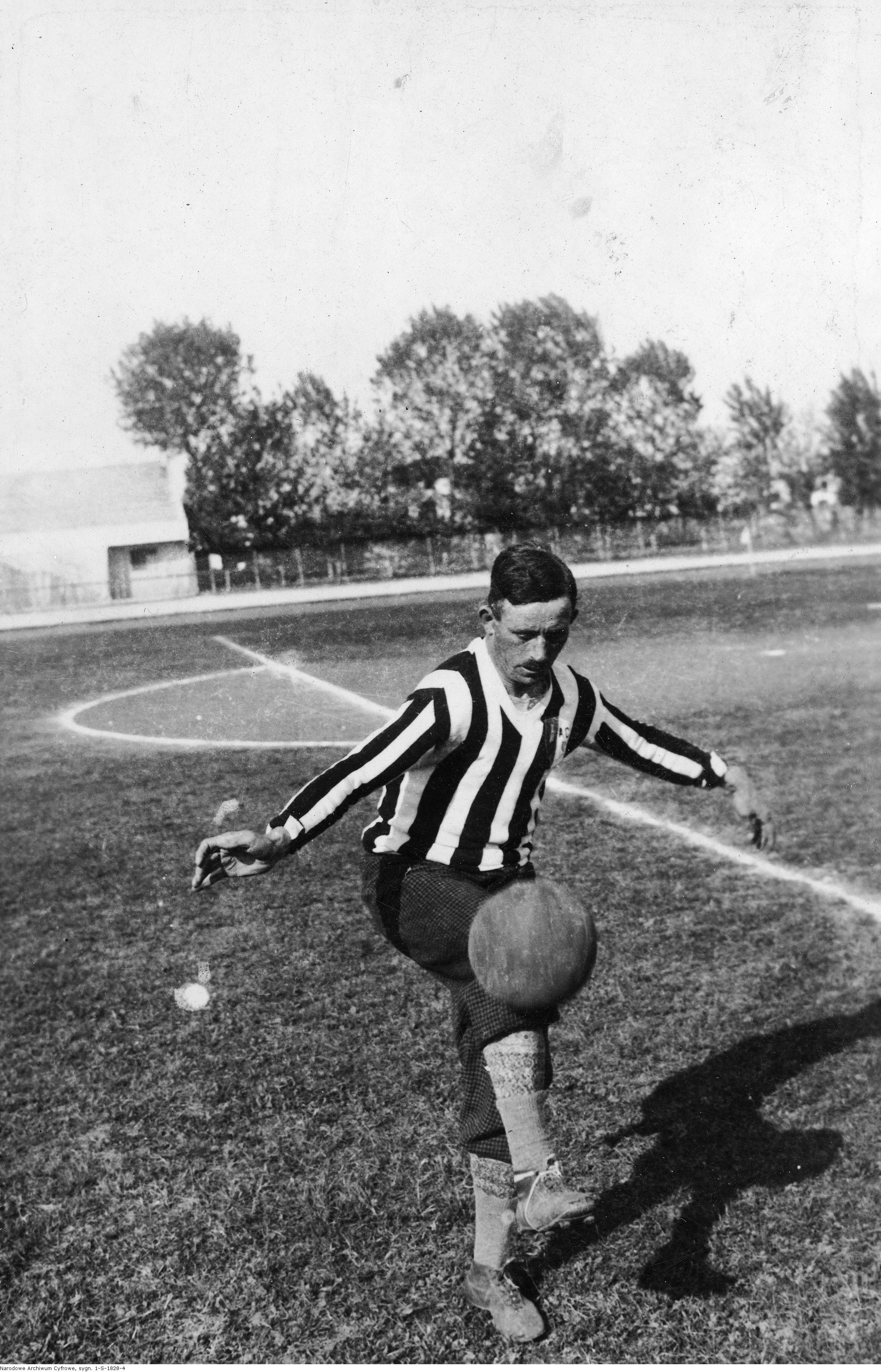 Trener piłkarzy w klubie sportowym Ruch Wielkie Hajduki Ferenc Fogl podczas żonglowania piłką.